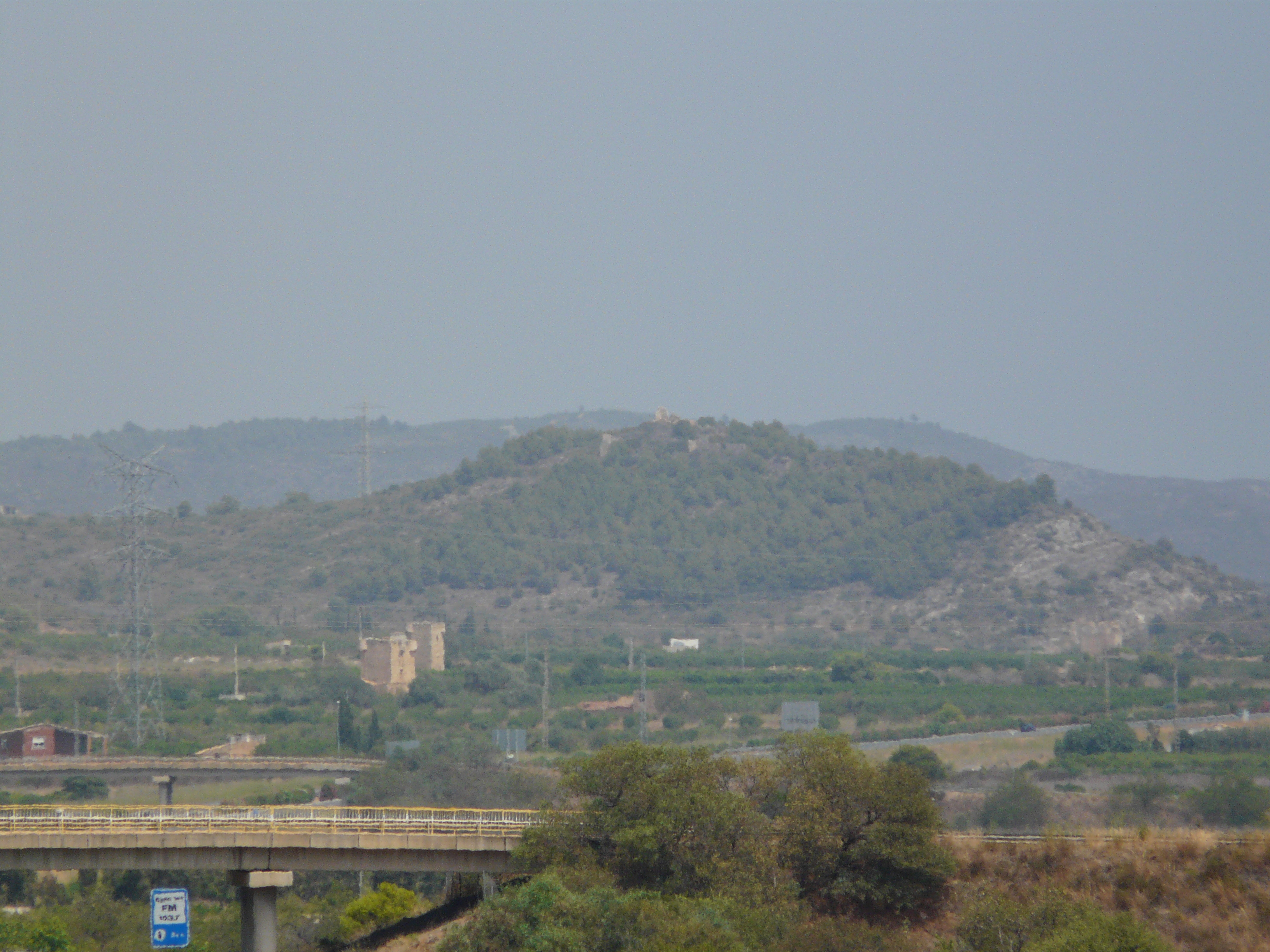 Torre dels Gats (Cabanes) Object location40° 09′ 33.63″ N, 0° 09′ 06.1″ E